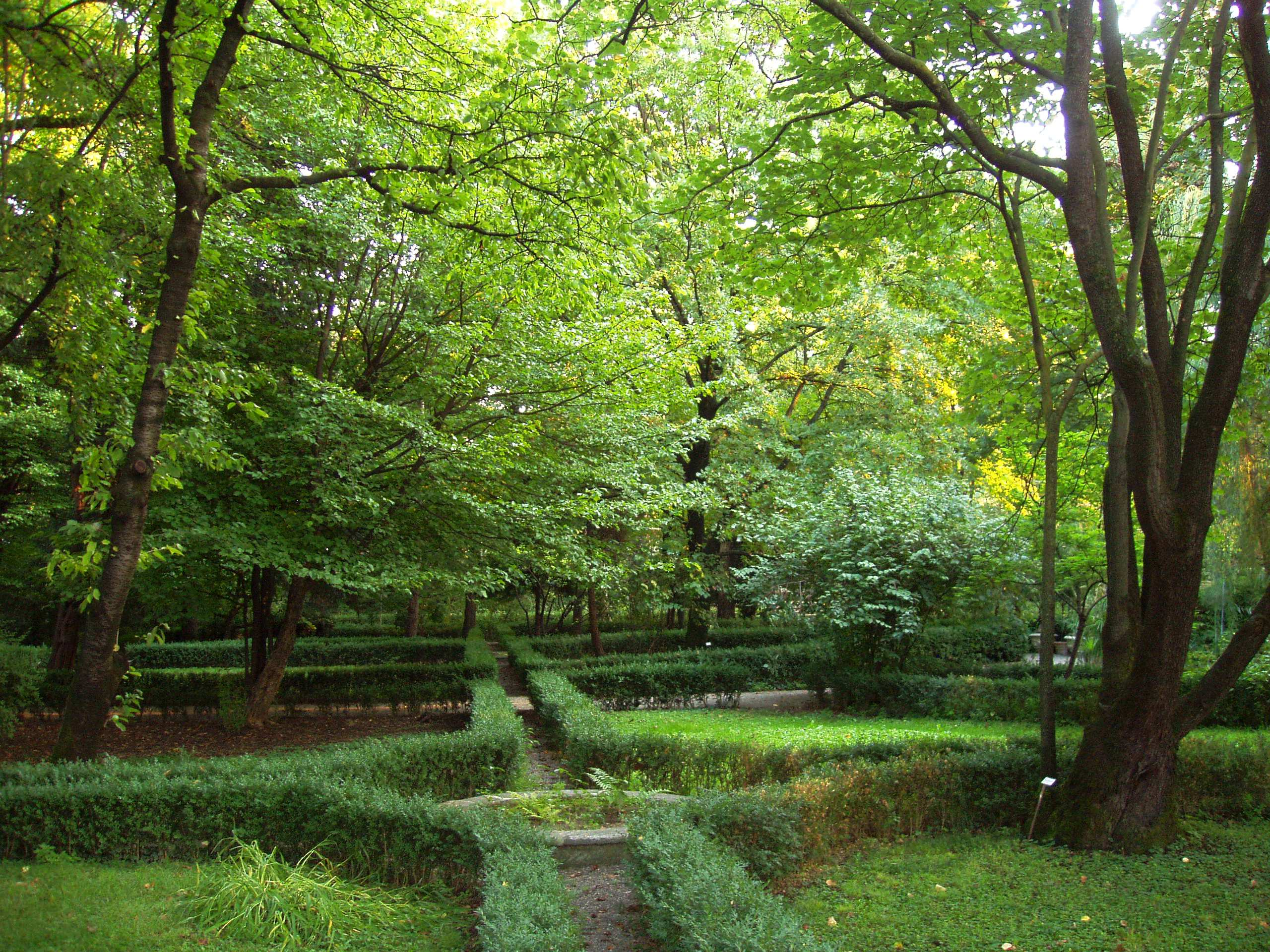 Orto Botanico dell'Università di Parma - garden. Parma, Italy.